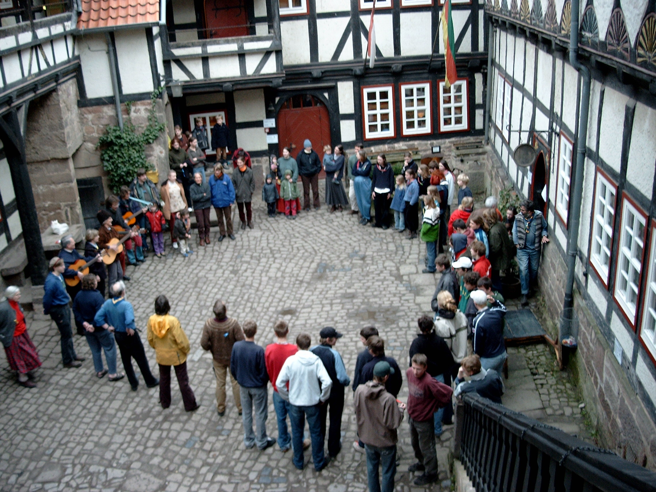 Innenhof der Burg Ludwigstein. Im Burghof findet die Morgenfeier zum Fest der Kulturinitiative Lebendig Leben statt